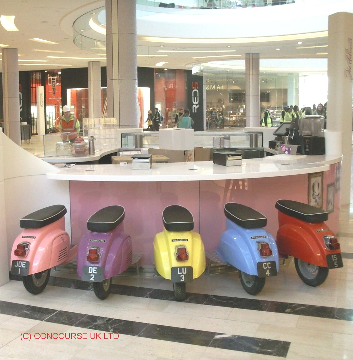 Piaggio Scooters at Delucci's